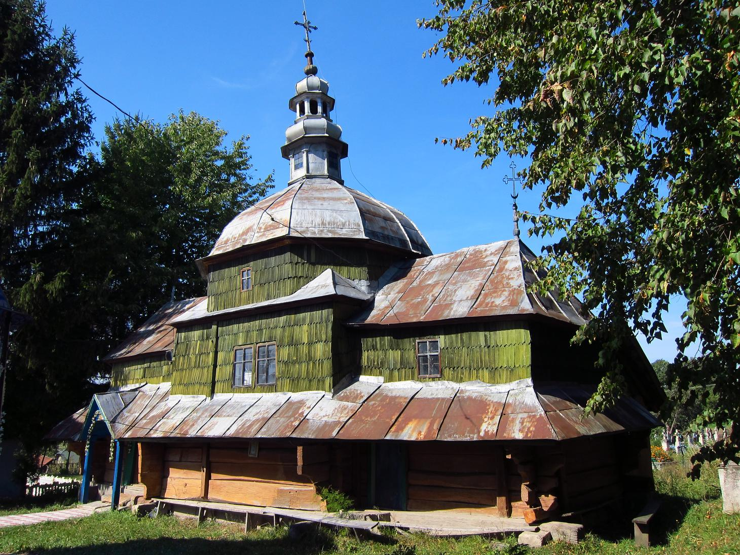 Церква святих верховних апостолів Петра і Павла в Урмані Бережанського району Тернопільської області.